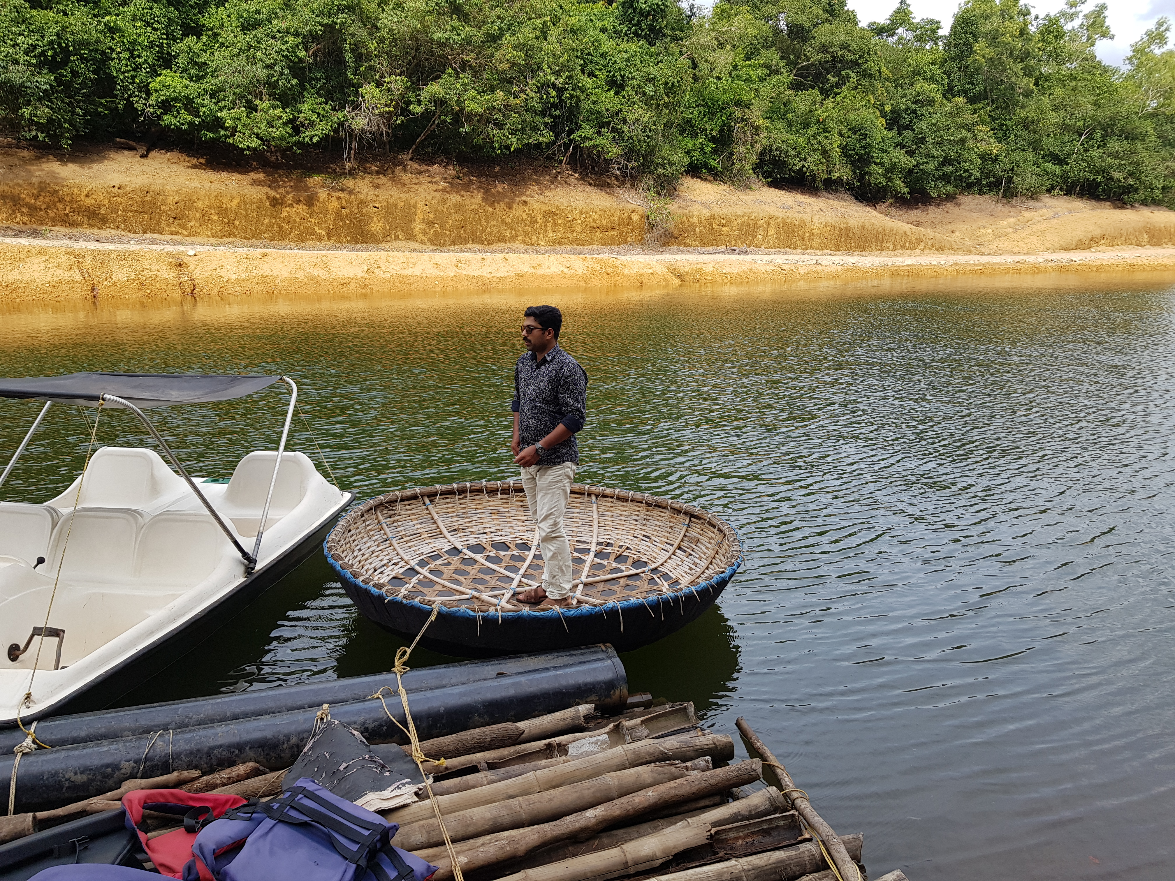 Kappukadu kuttavanchi